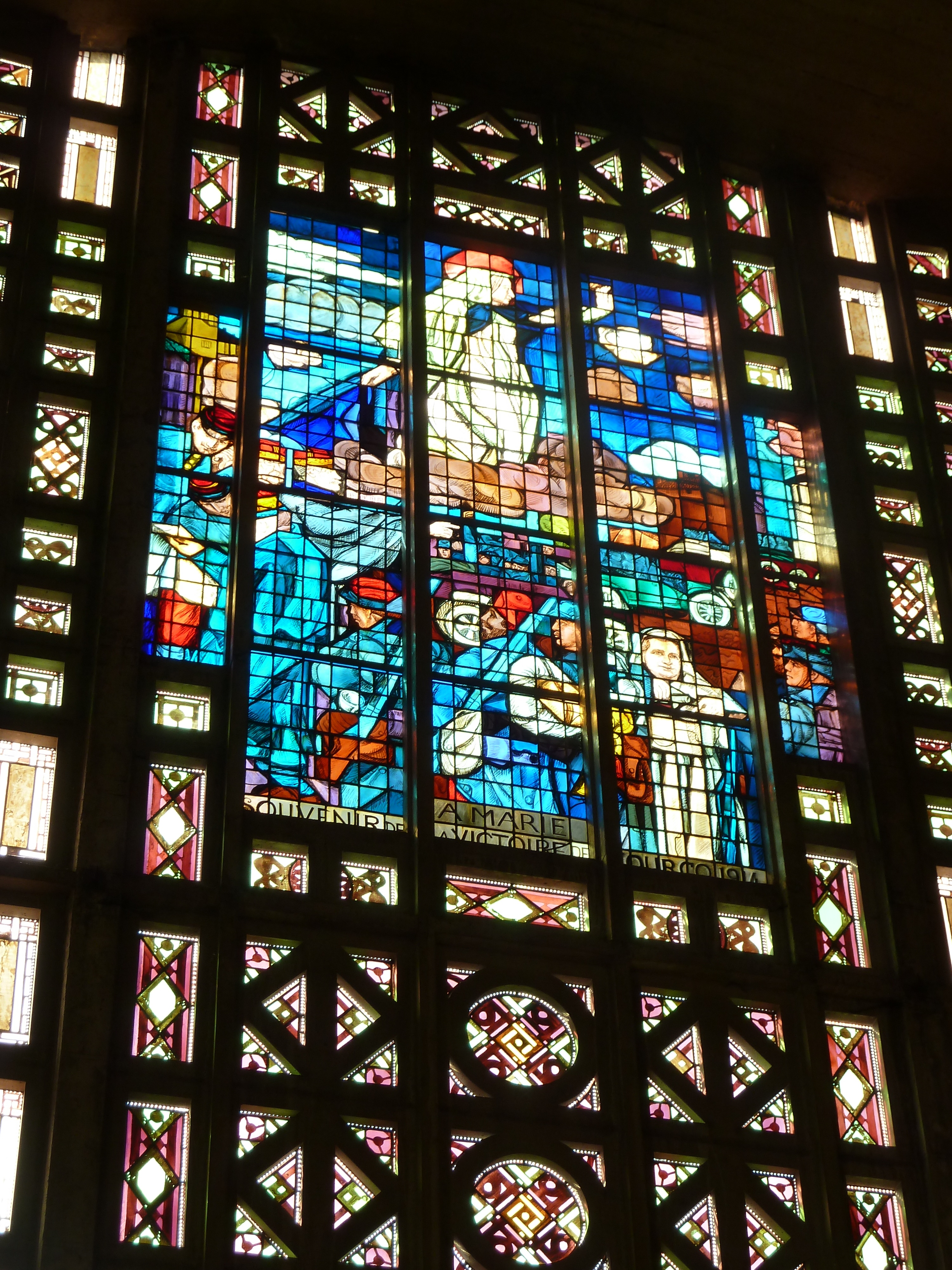 Église Notre-Dame du Raincy - Le Raincy - Seine-Saint-Denis - France - Mérimée PA00079948 .